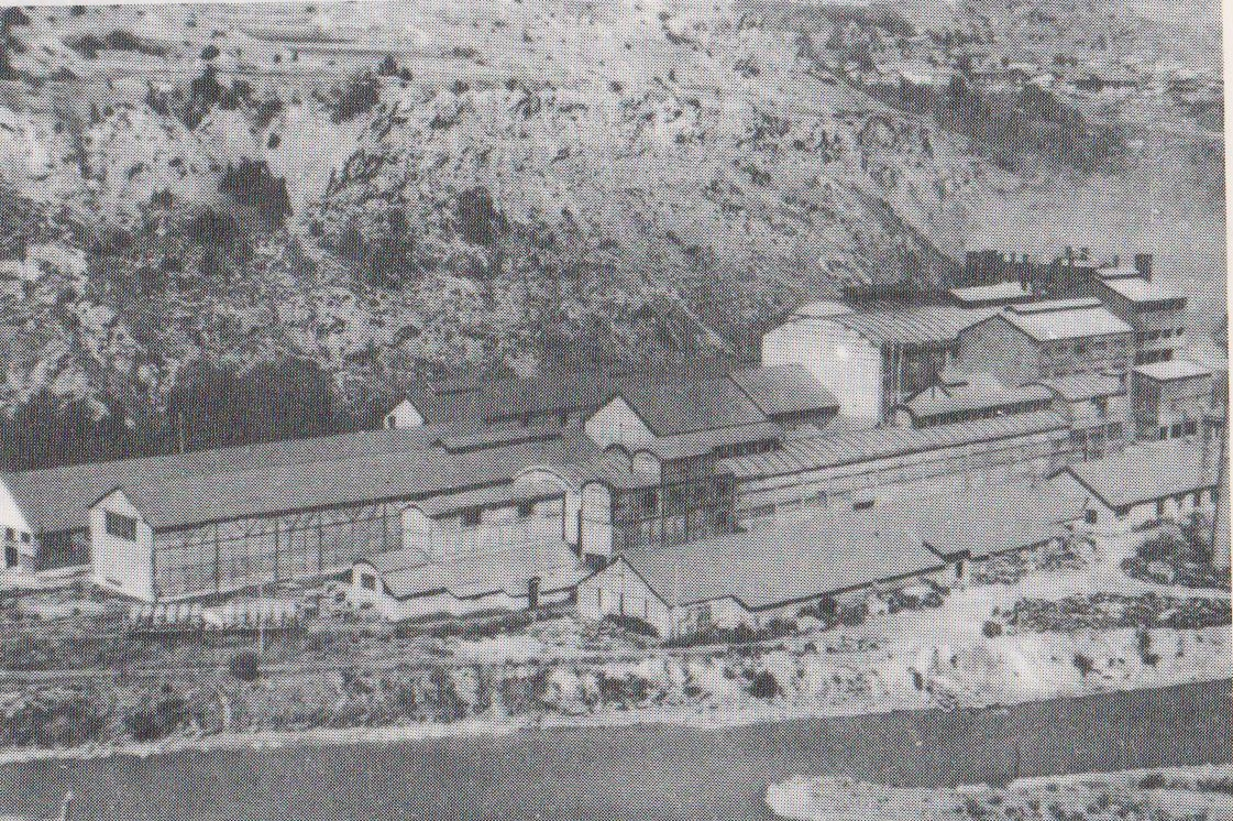 Photographie de l'usine en 1871.